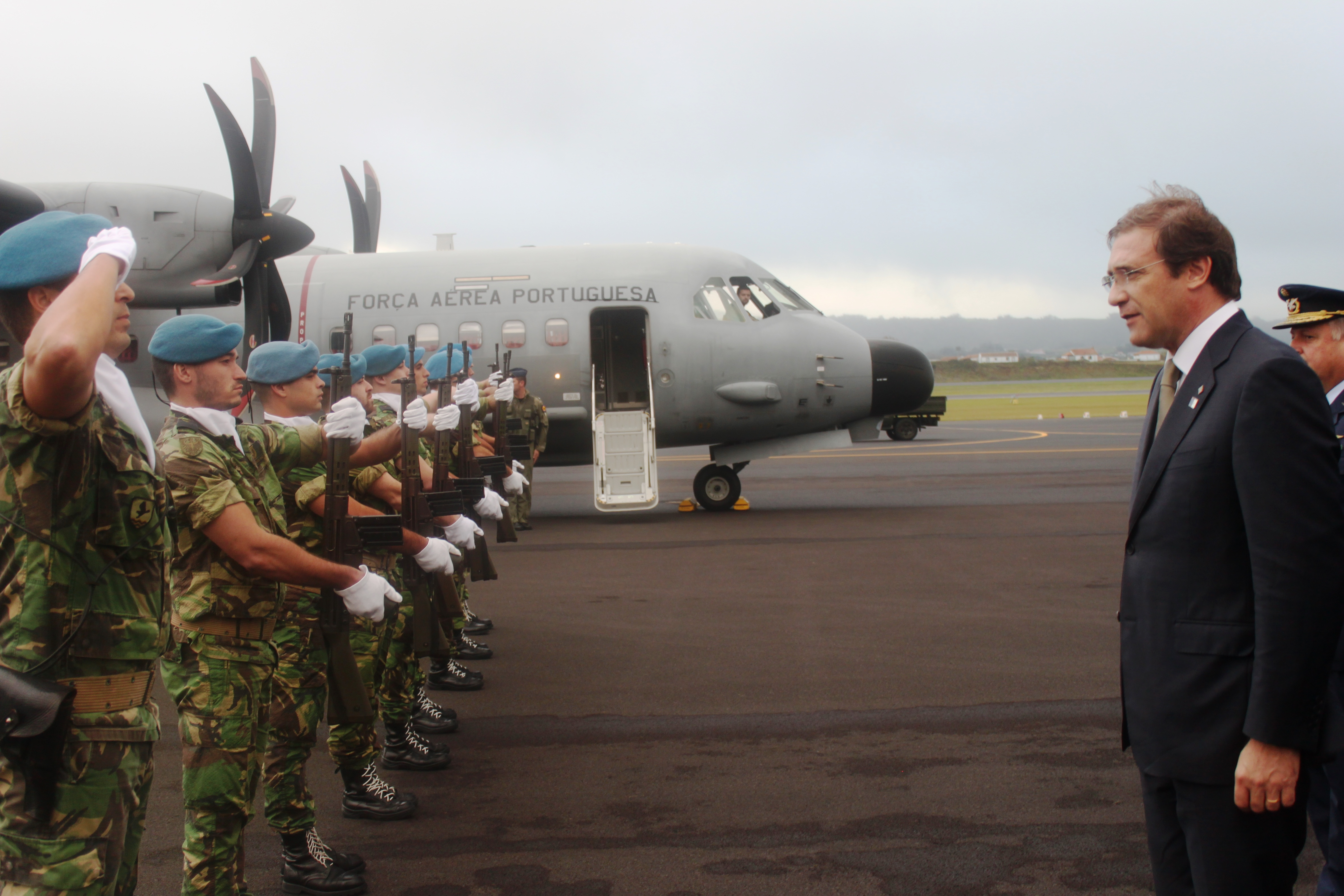 Foto ilustrativa